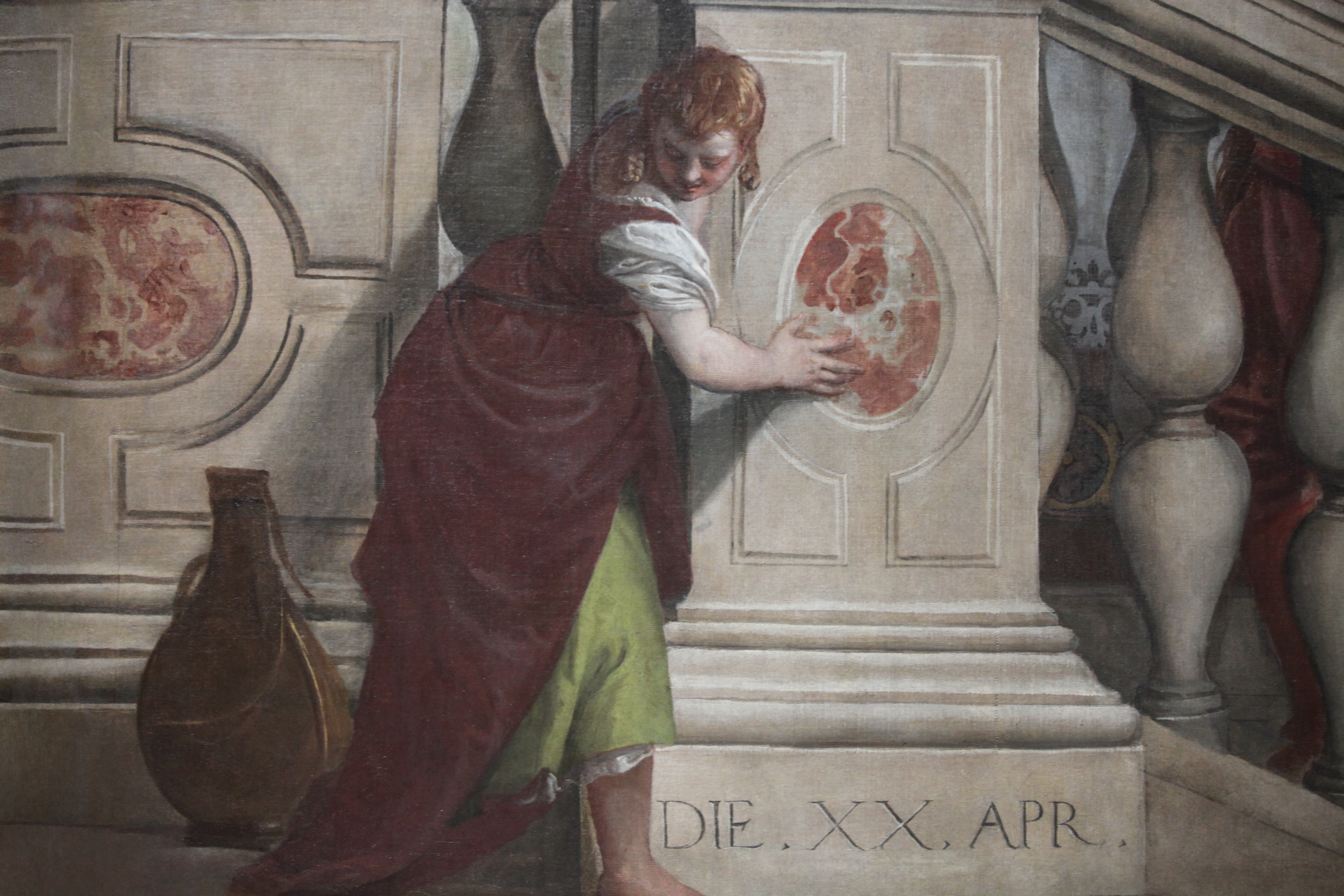 Gallerie dell'Accademia - MIBAC This is a photo of a monument which is part of cultural heritage of Italy.